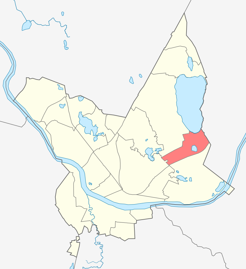 Микрорайон Старые Стропы карте Даугавпилса.